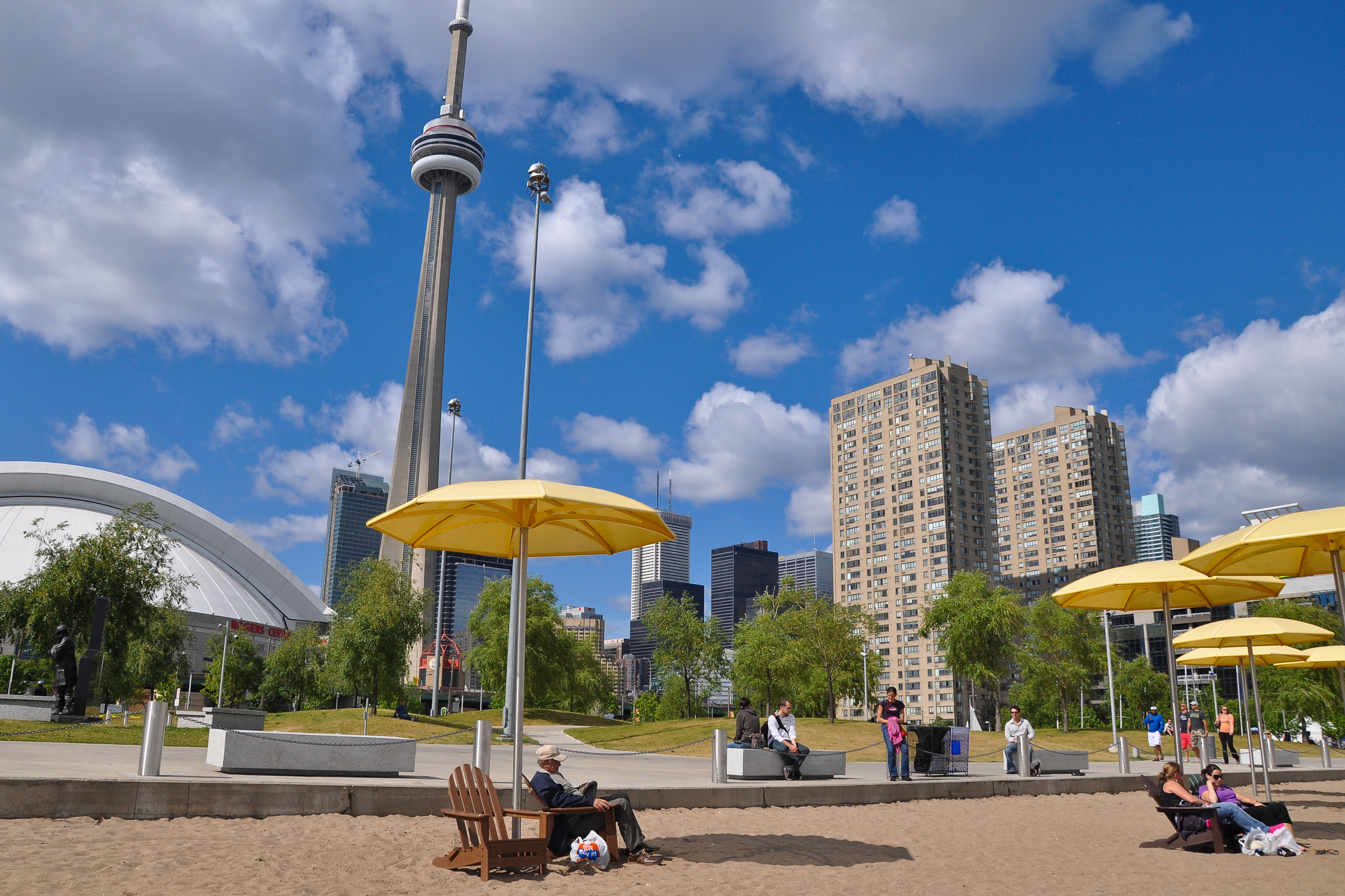 HTO Beach, Toronto, Ontario, Canada.